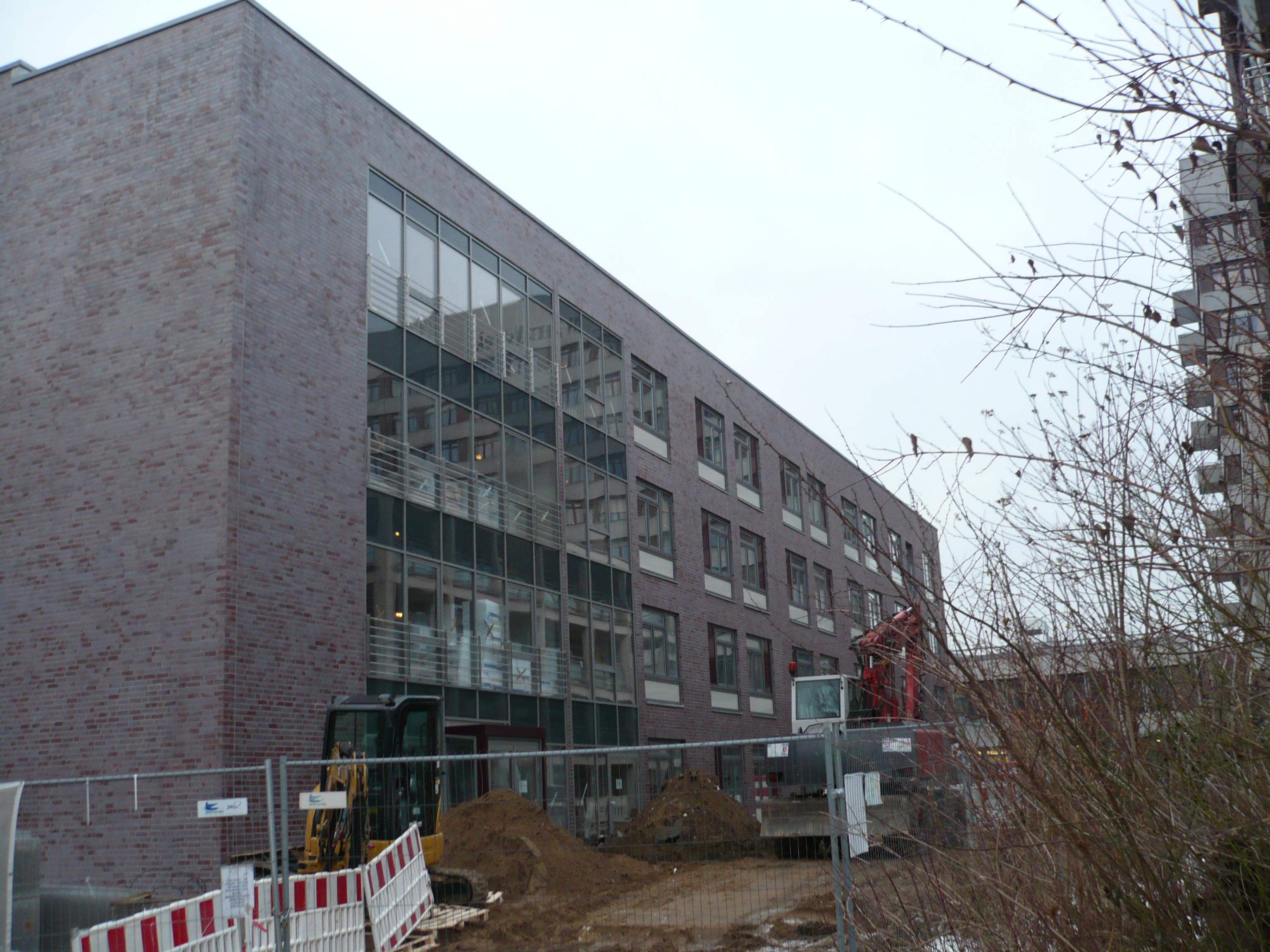 Asklepios Klinik Wandsbek, Hamburg Baustelle Psychiatrie